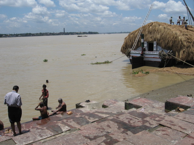 Bagbazar Ghat, Kolkata